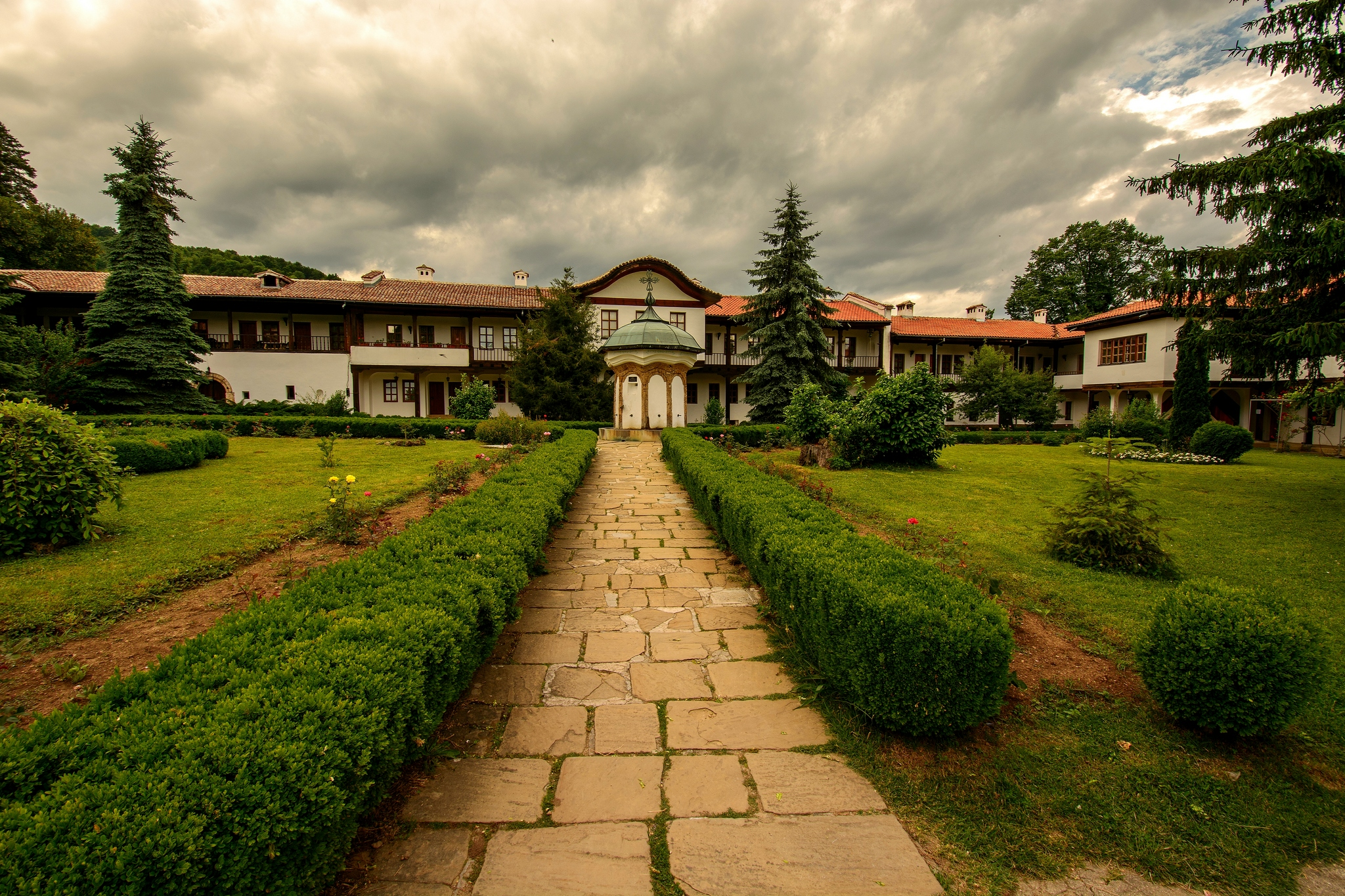 Соколски манастир